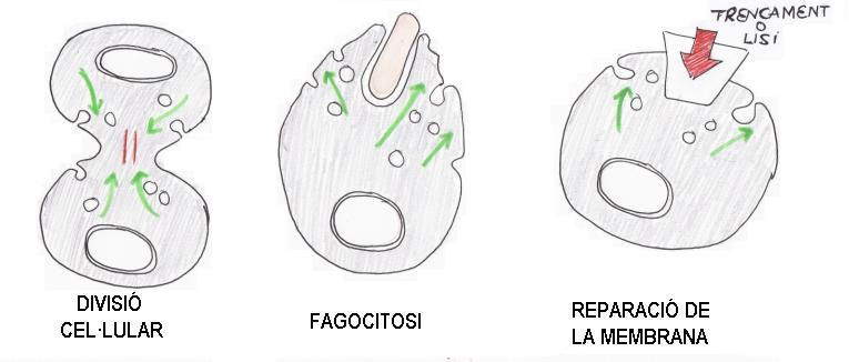 Tres situacions que requereixen una exocitosi massiva, trencant l'equilibri del cicle endocític-exocític